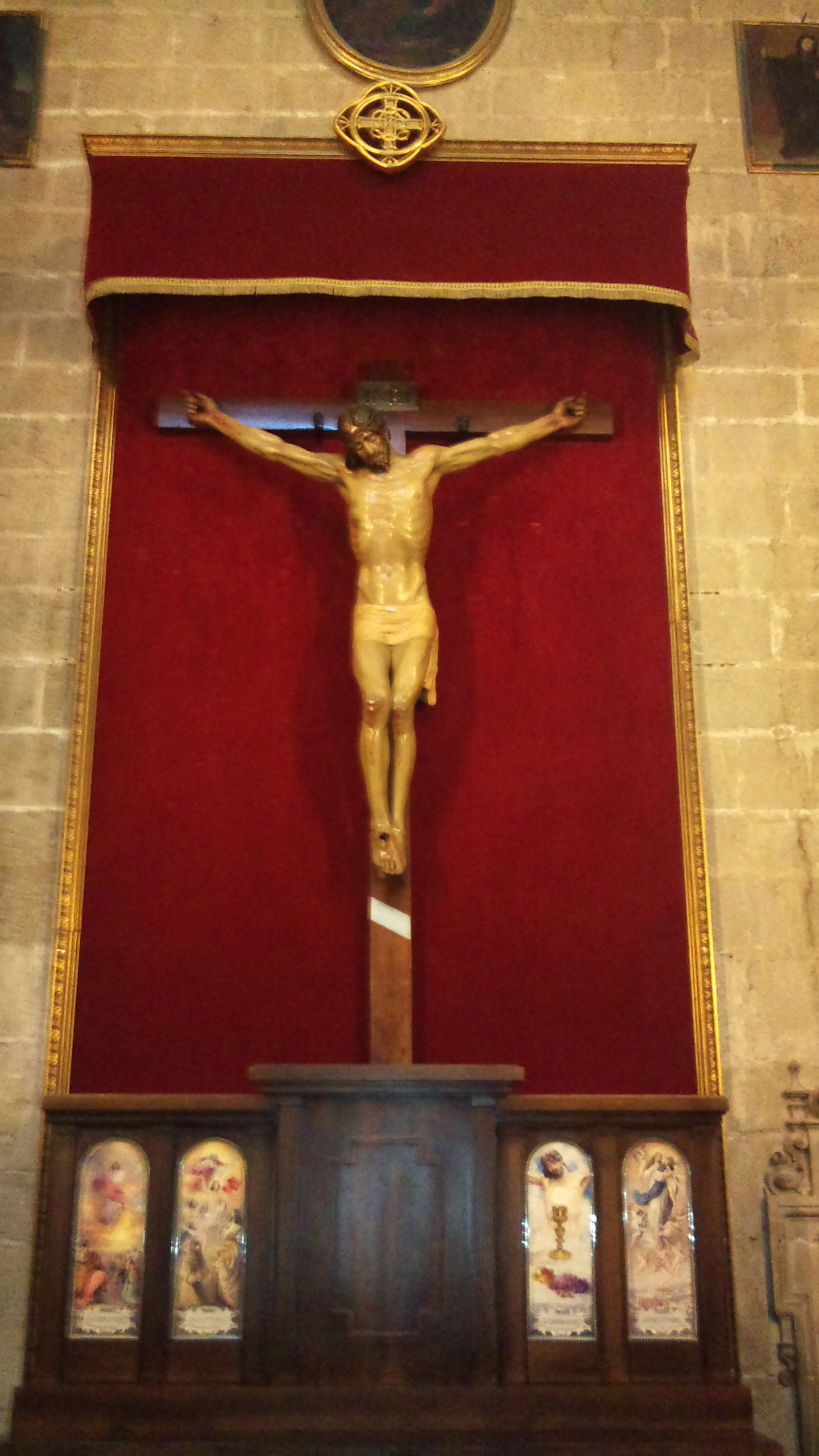 Santísimo Cristo de la Buena Muerte en su capilla de la Santa Iglesia Catedral de Jaén.